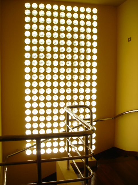 Interior da casa modernista à rua Santa Cruz